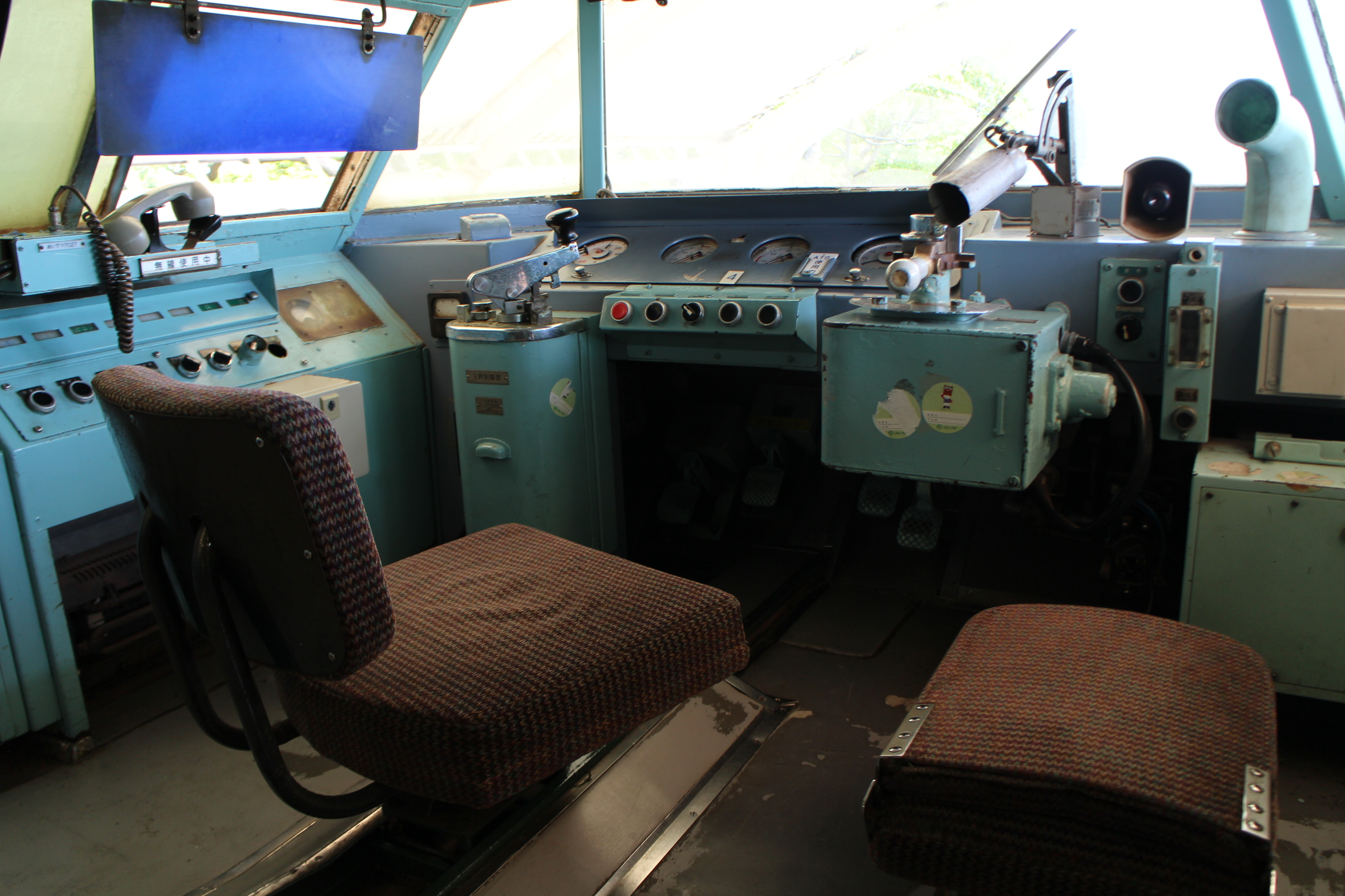 名古屋鉄道7000系運転席